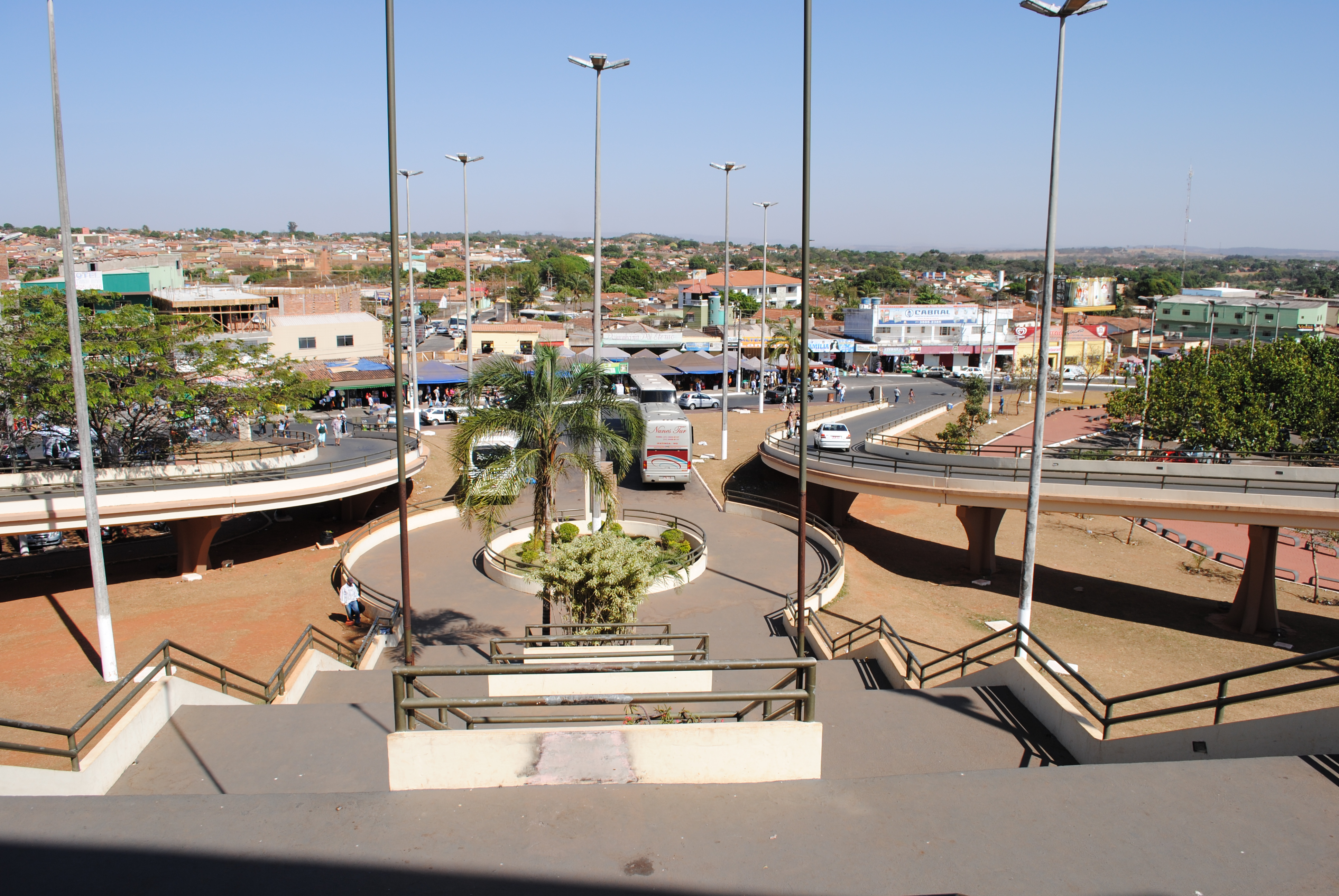 Cidade de Trindade, Goiás, Brasil. Visão a partir do Santuário Basílica do Divino Pai Eterno (durante a Festa de Trindade).